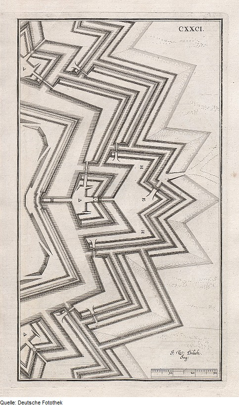 Original image description from the Deutsche Fotothek Architektur & Geometrie & Festungsbau & Kronwerk & Tenaille